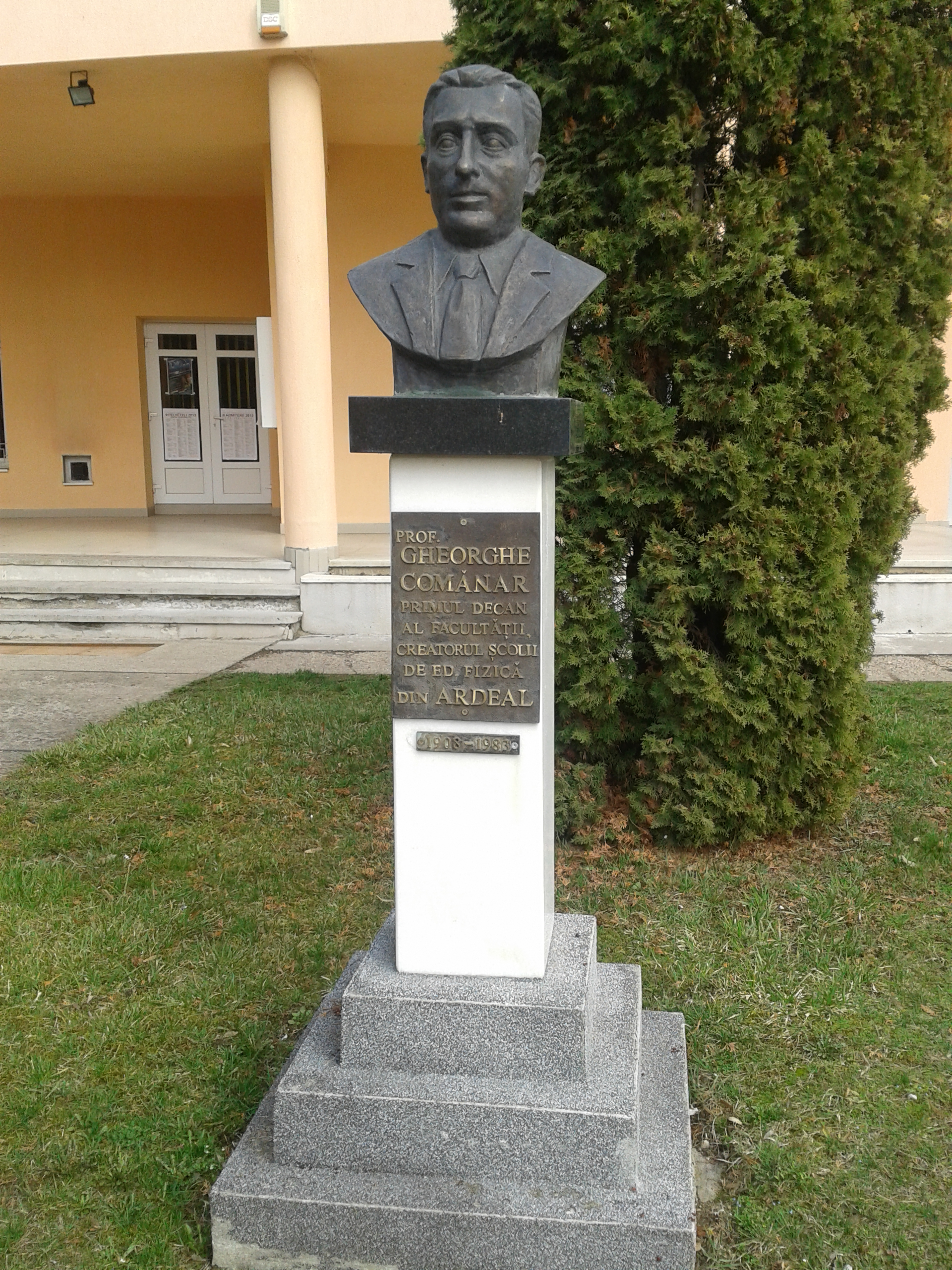 Bustul lui Gheorghe Comănar din Parcul Sportiv "Iuliu Haţieganu" Cluj Napoca. "Prof. Gheorghe Comănar primul decan al facultăţii, creatorul şcolii de ed. fizică din Ardeal 1908-1983"